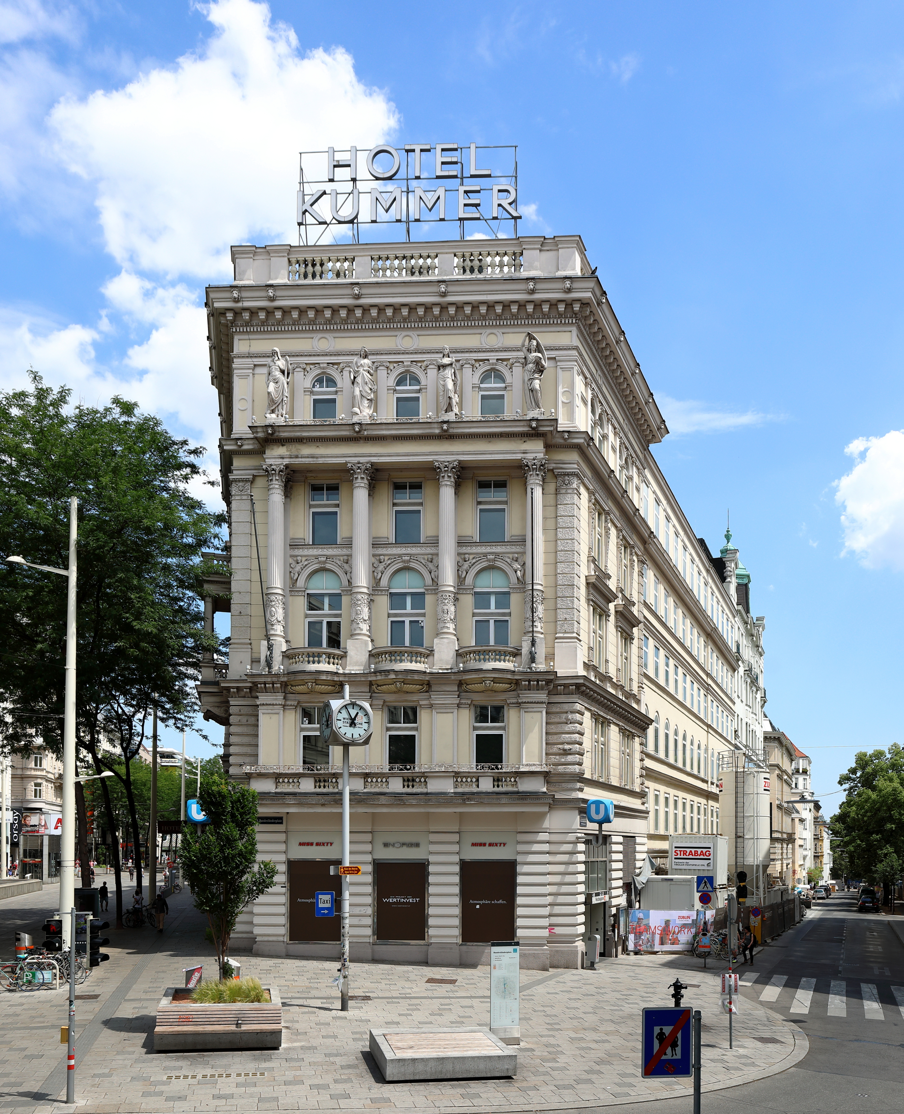 Das ehemalige Hotel Kummer Ecke Mariahilfer Straße 71 A / Schadekgasse 20 im 6. Wiener Bezirk Mariahilf.Der fünfgeschossige streng historistische Hotelbau wurde nach Plänen der Architekten Eduard Kaiser und Ludwig Tischler nach einem Entwurf von Carl Schumann ab 1870 errichtet und 1872 als „Zum goldenen Kreuz“ von Michael Kummer eröffnet. Mitte der 2010er Jahre wurde das Hotel verkauft und 2017 geschlossen. 2020 soll es nach einem Umbau und der Errichtung eines zweigeschossigen Dachaufbaus wieder als Hotel eröffnet werden.